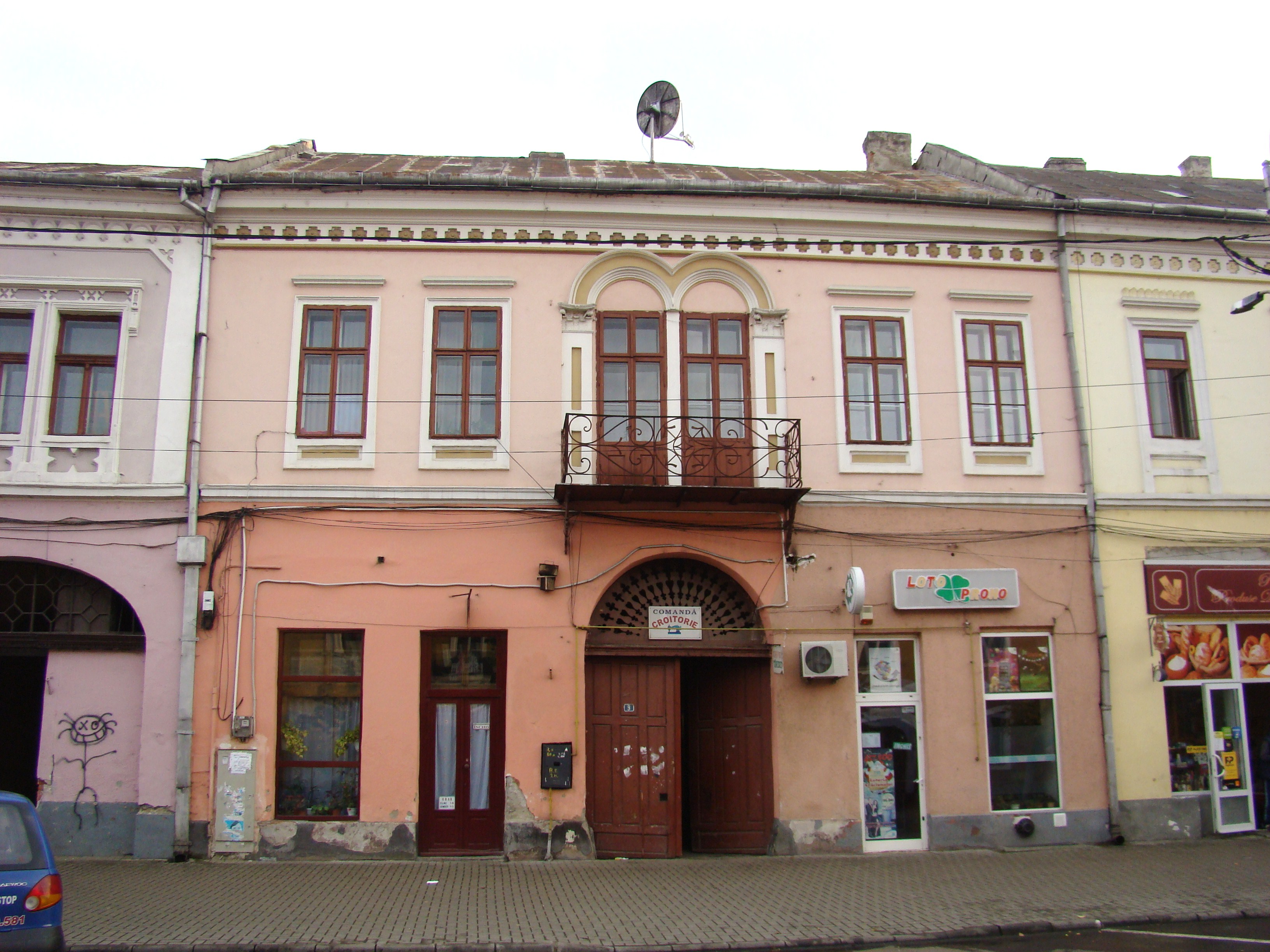 Casă, municipiul Sighetu Marmației, Str. Mihaly Ioan de Apșa 9